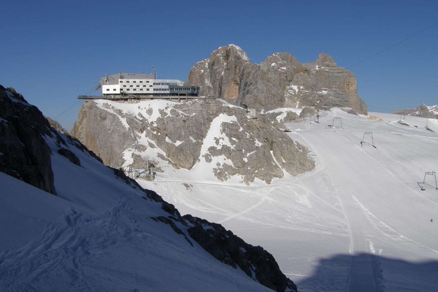 Dachstein, Bergstation, górna stacja - 2700 m